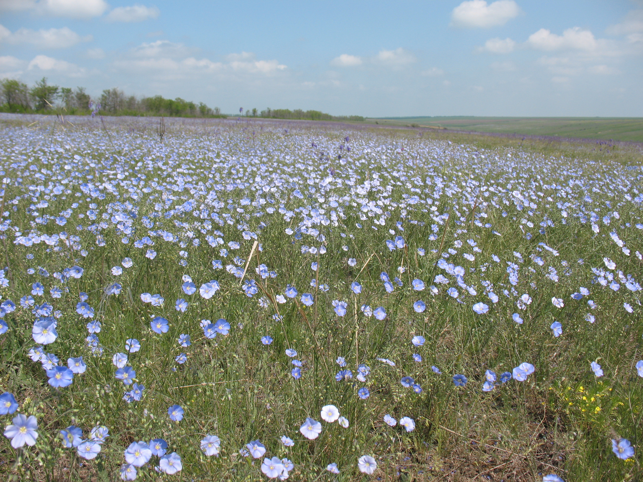 «Тилігульський», Березанський район